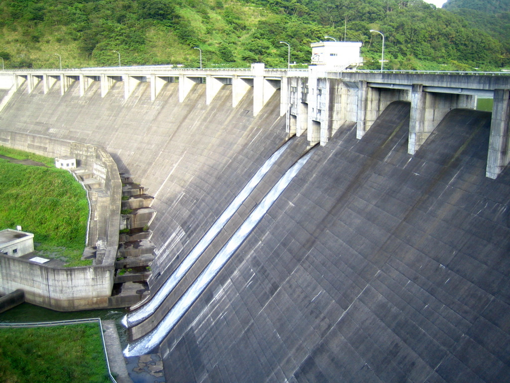 Minmikawa-dam